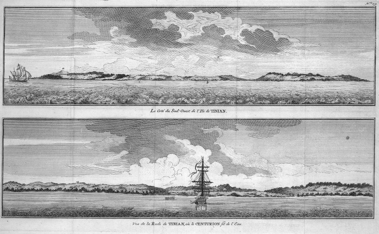 [Illustrations de Voyage autour du monde] Auteur : George Anson Éditeur : Henri-Albert Gosse et Compagnie (Genève) 1750